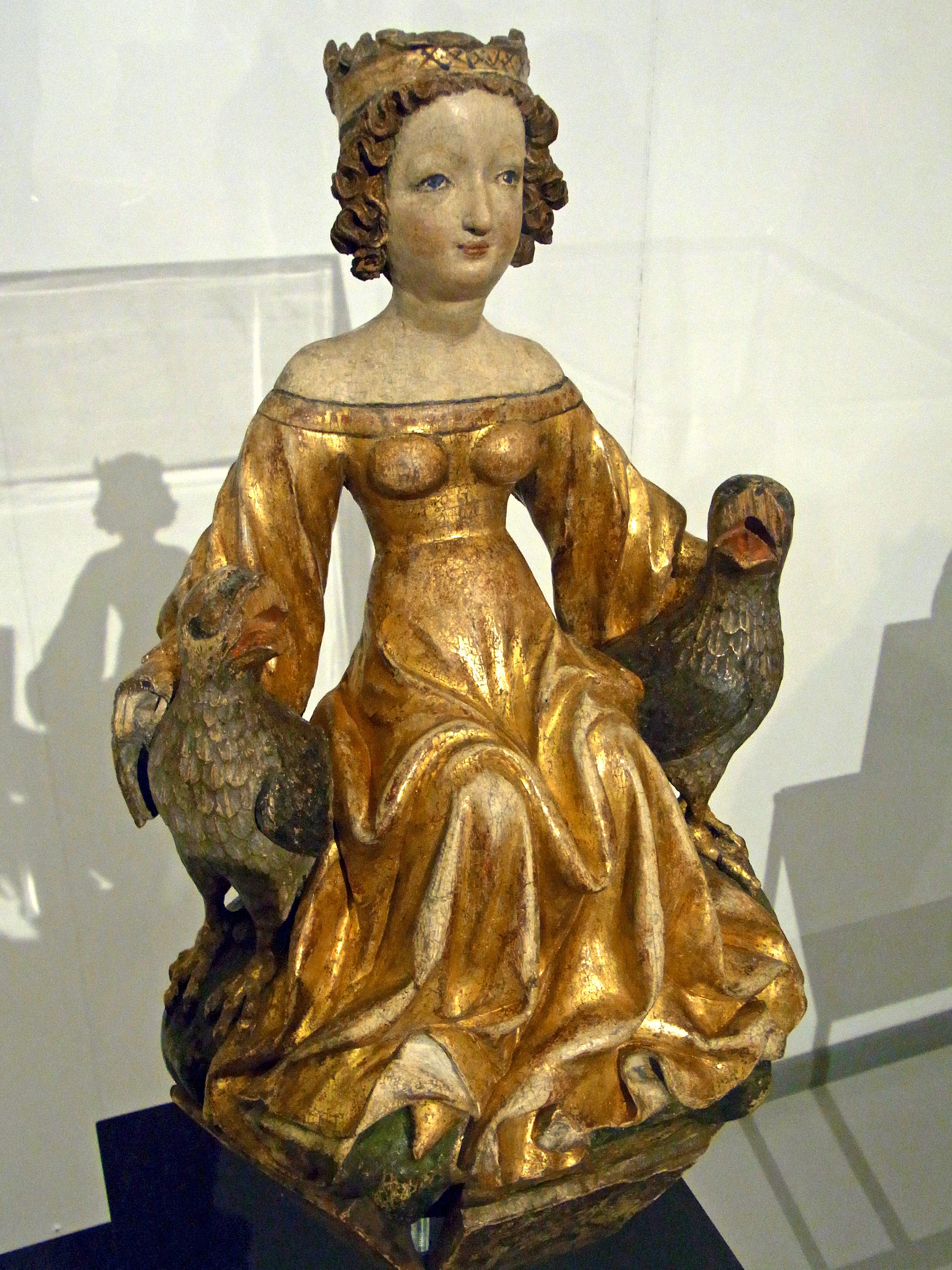 Weibliche Ganzfigur eines ehemaligen Geweihleuchters Mittelrhein ca. 1430 Nussbaum Stadtmuseum Wiesbaden